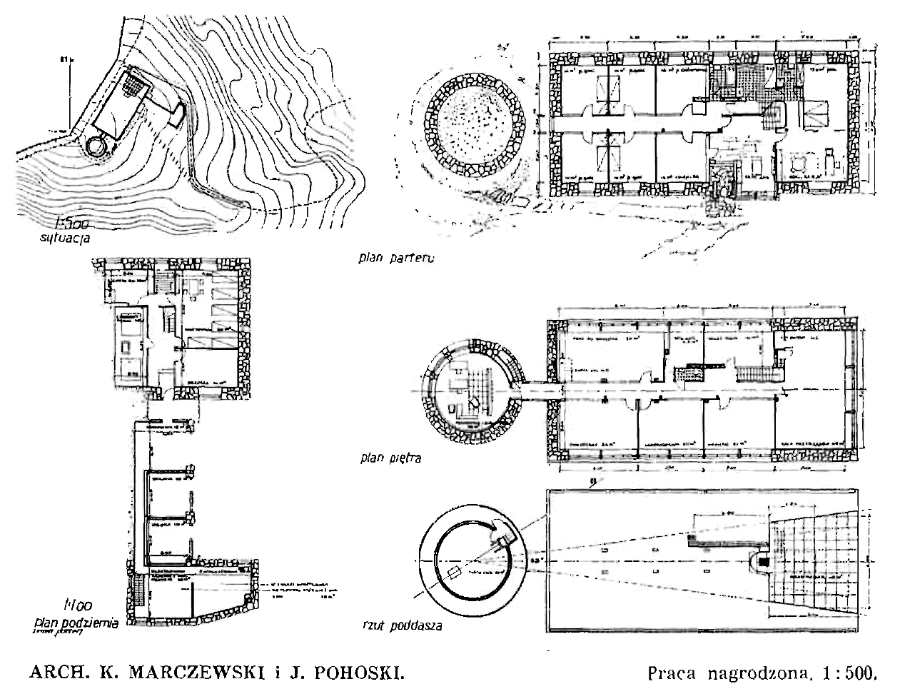 Проект-переможець тендеру для будівництва обсерваторії